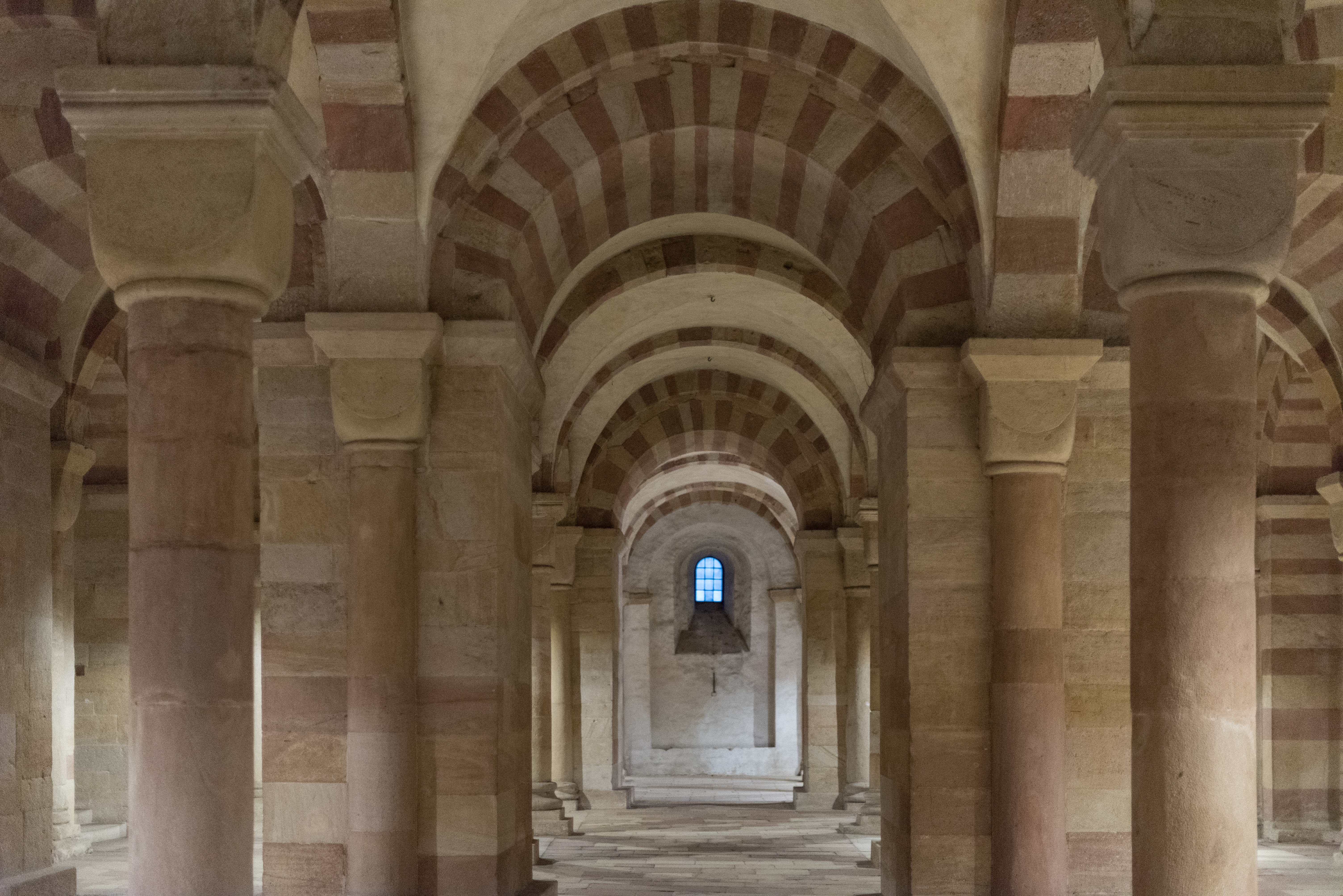 Speyer, Dom, Krypta